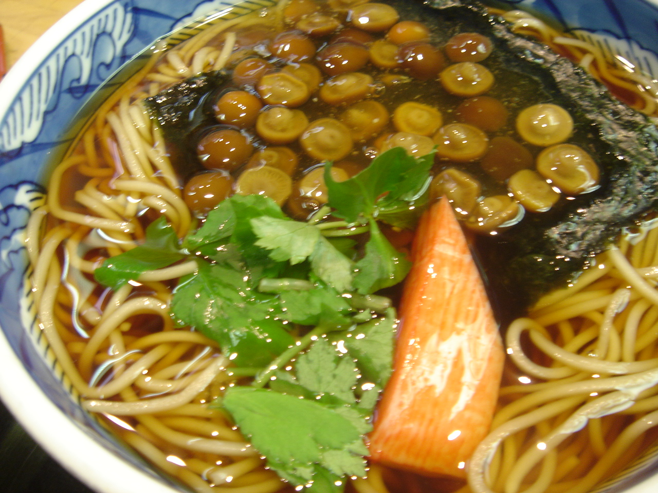 فطر الناميكو يستخدم لتحضير الكثير من الأطباق اليابانية.japanese noodle